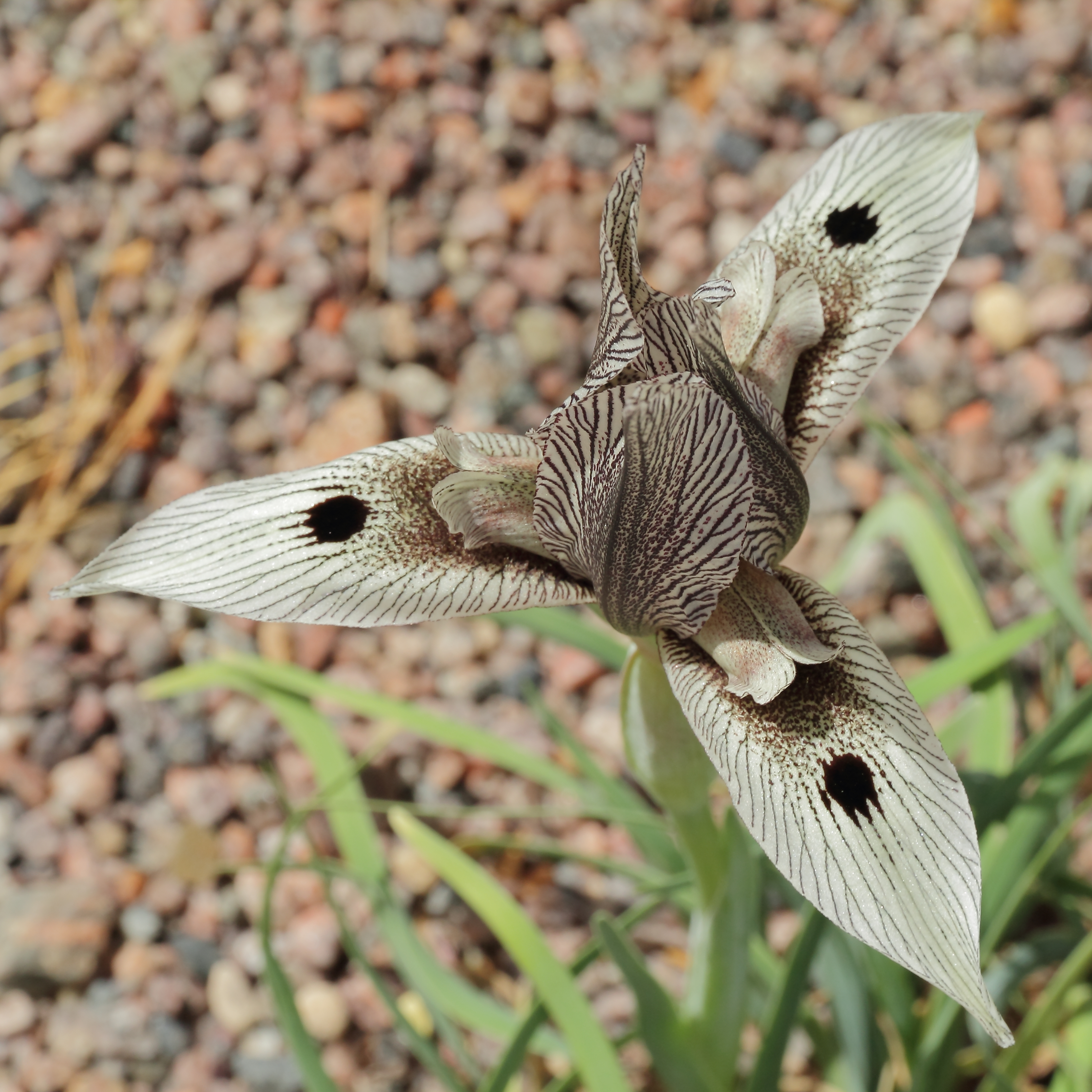 Iris helena i Göteborgs Botaniska Trädgård.